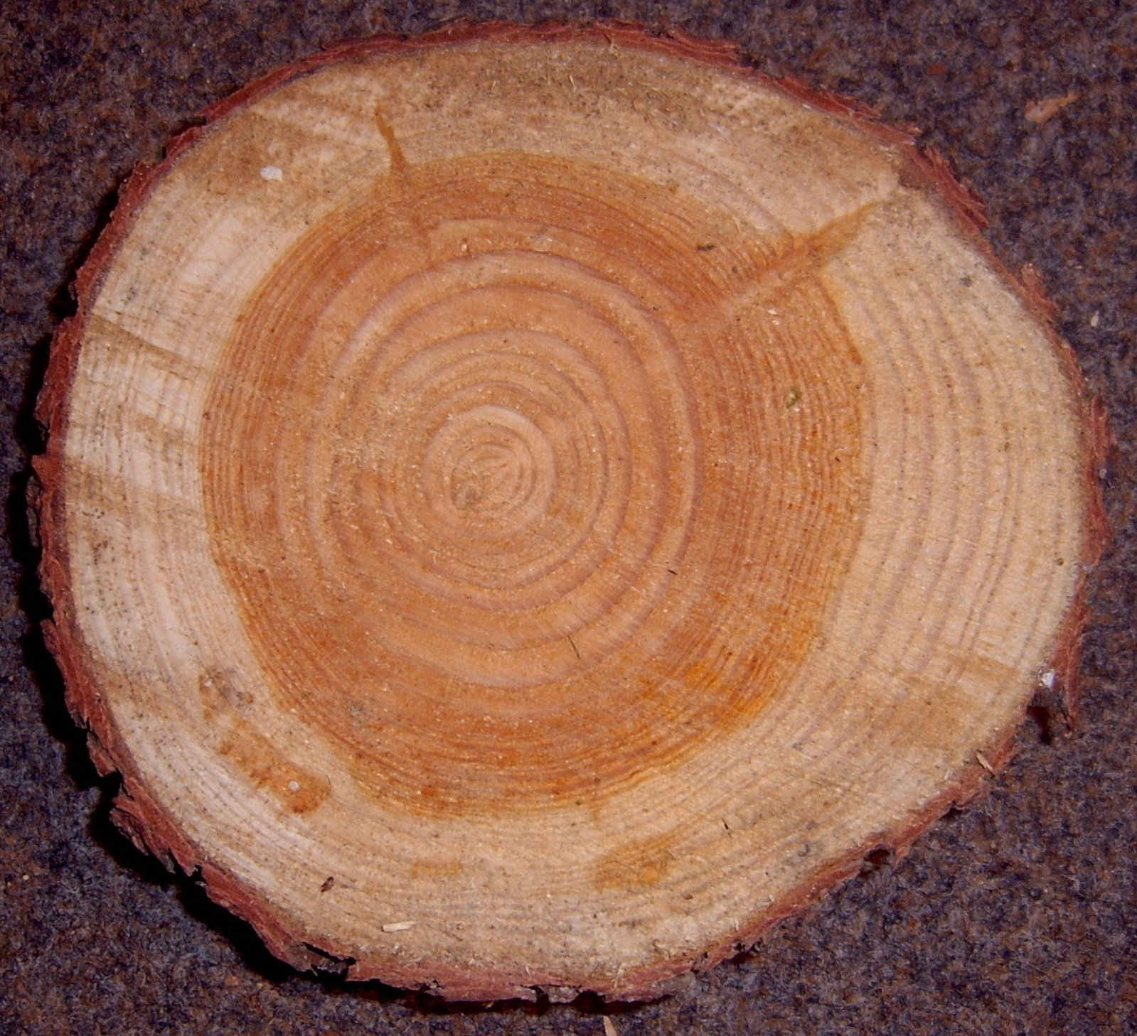 Foto taken by Lumbar 16:53, 6 November 2005 (UTC) in Osnabrück